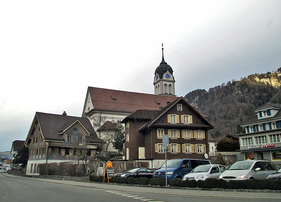 Wolfenschiessen, Nidwalden